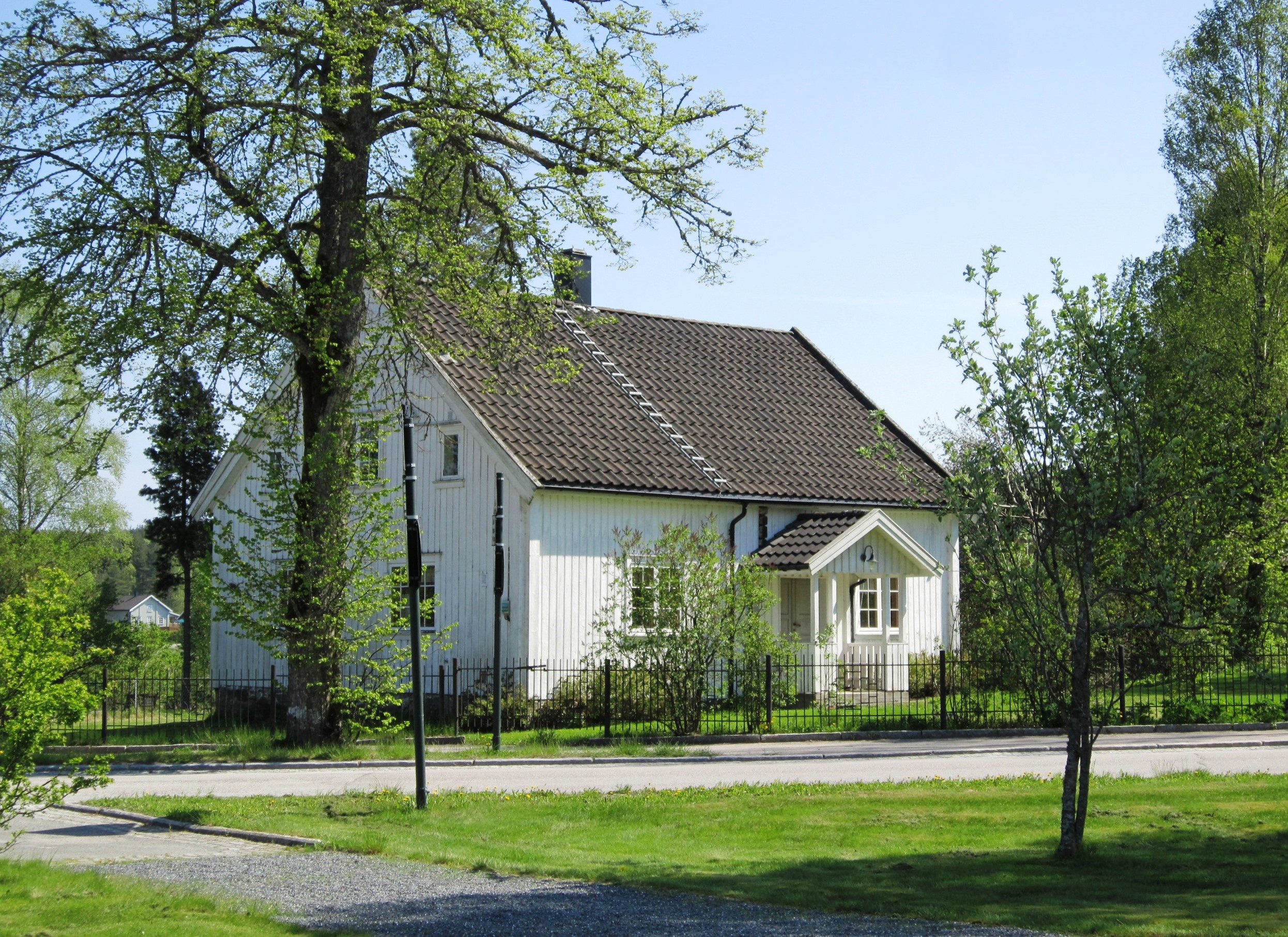 Primær fylkesvei 115 like ved Svinndal kirke, Våler i Østfold